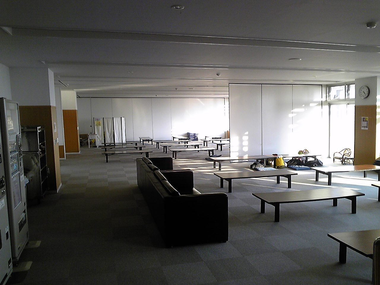 特になし。